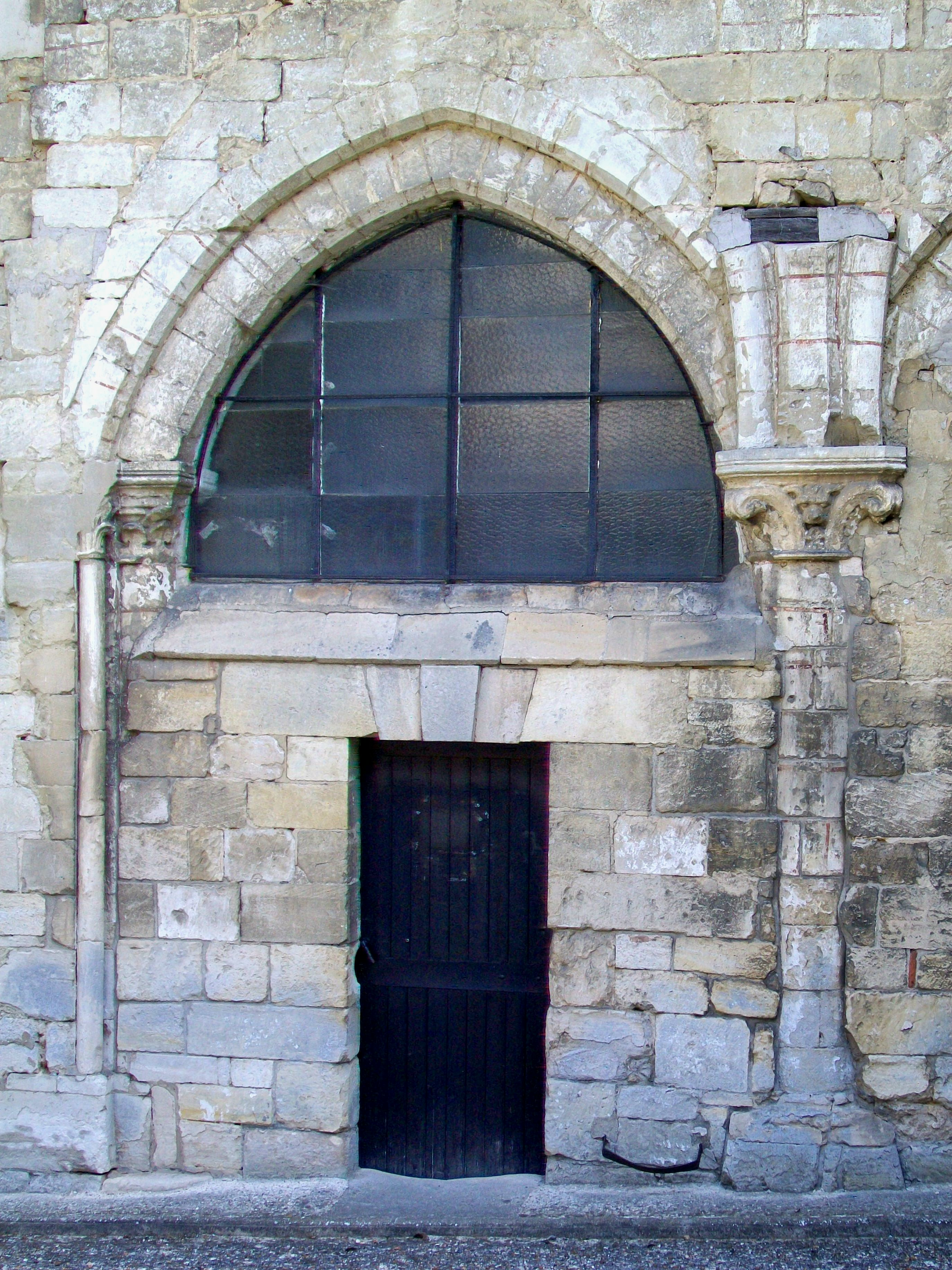 Vestige de l'une des deux travées du bas-côté sud-ouest démoli.